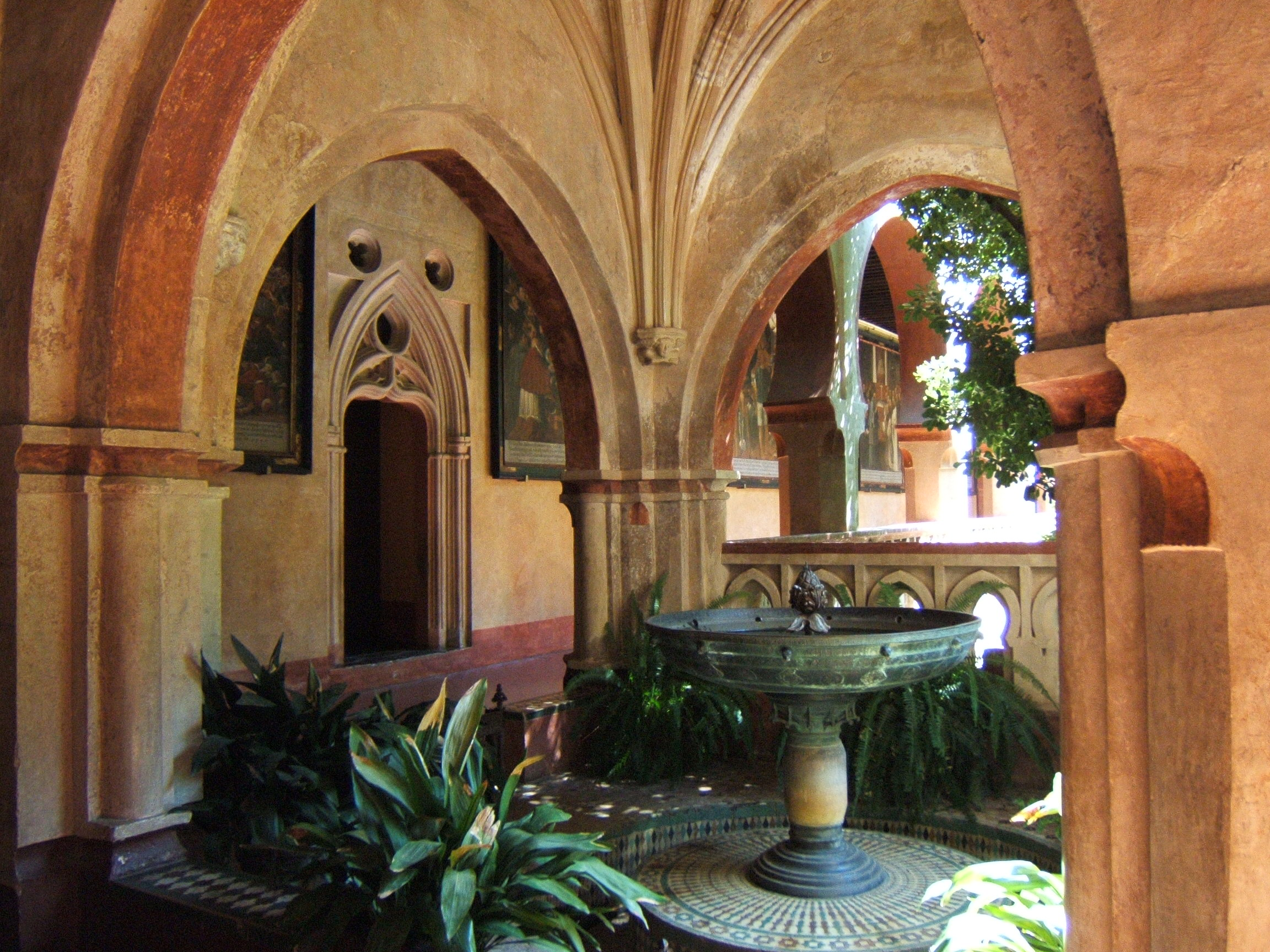 Fuente del claustro mudéjar del Real Monasterio de Santa María de Guadalupe